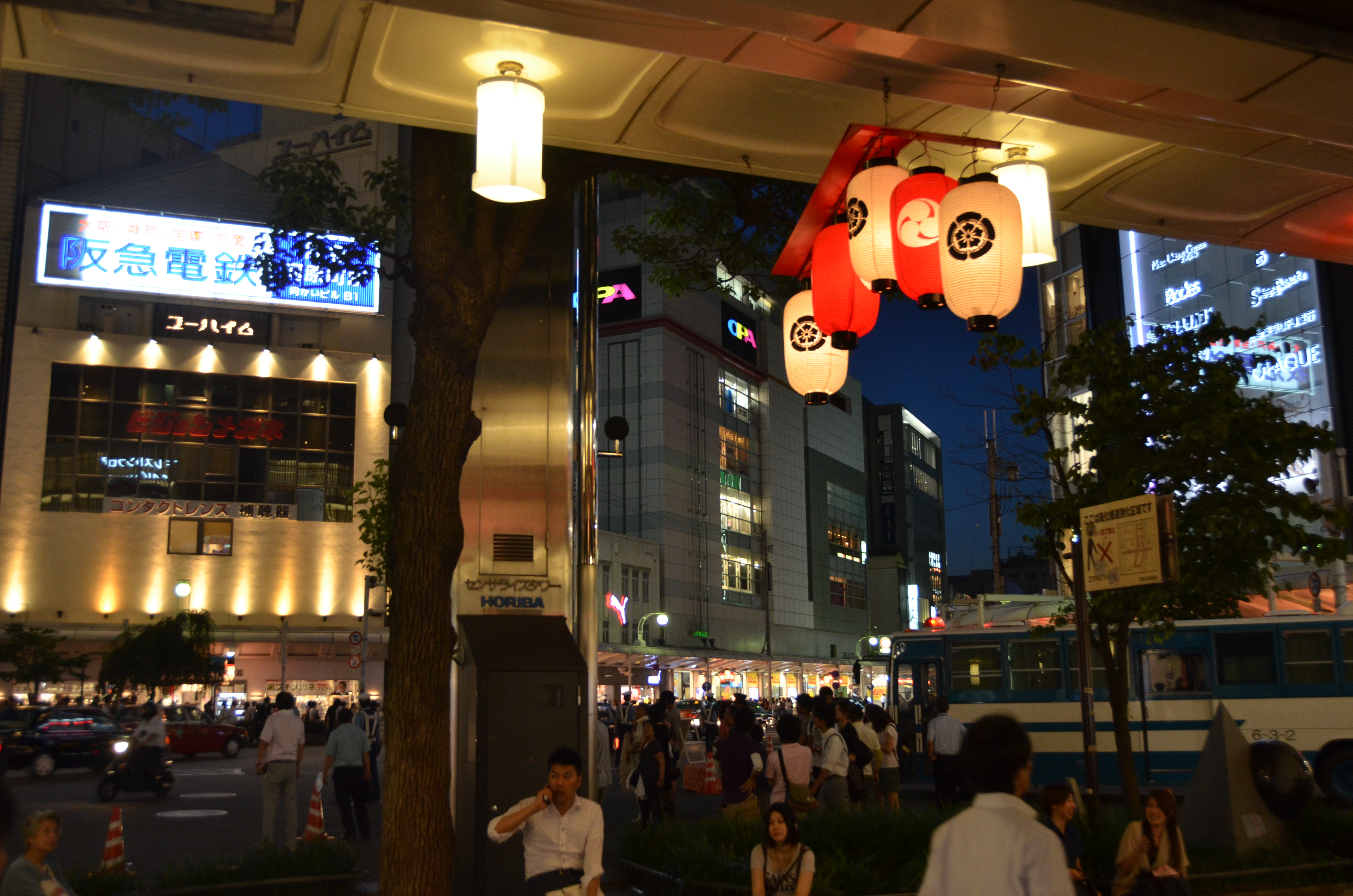 2011年7月15日 四条河原町